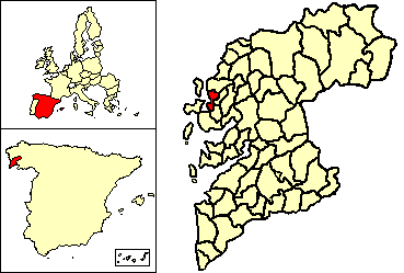 Municipio de Cambados respecto a la provincia de Pontevedra (España)